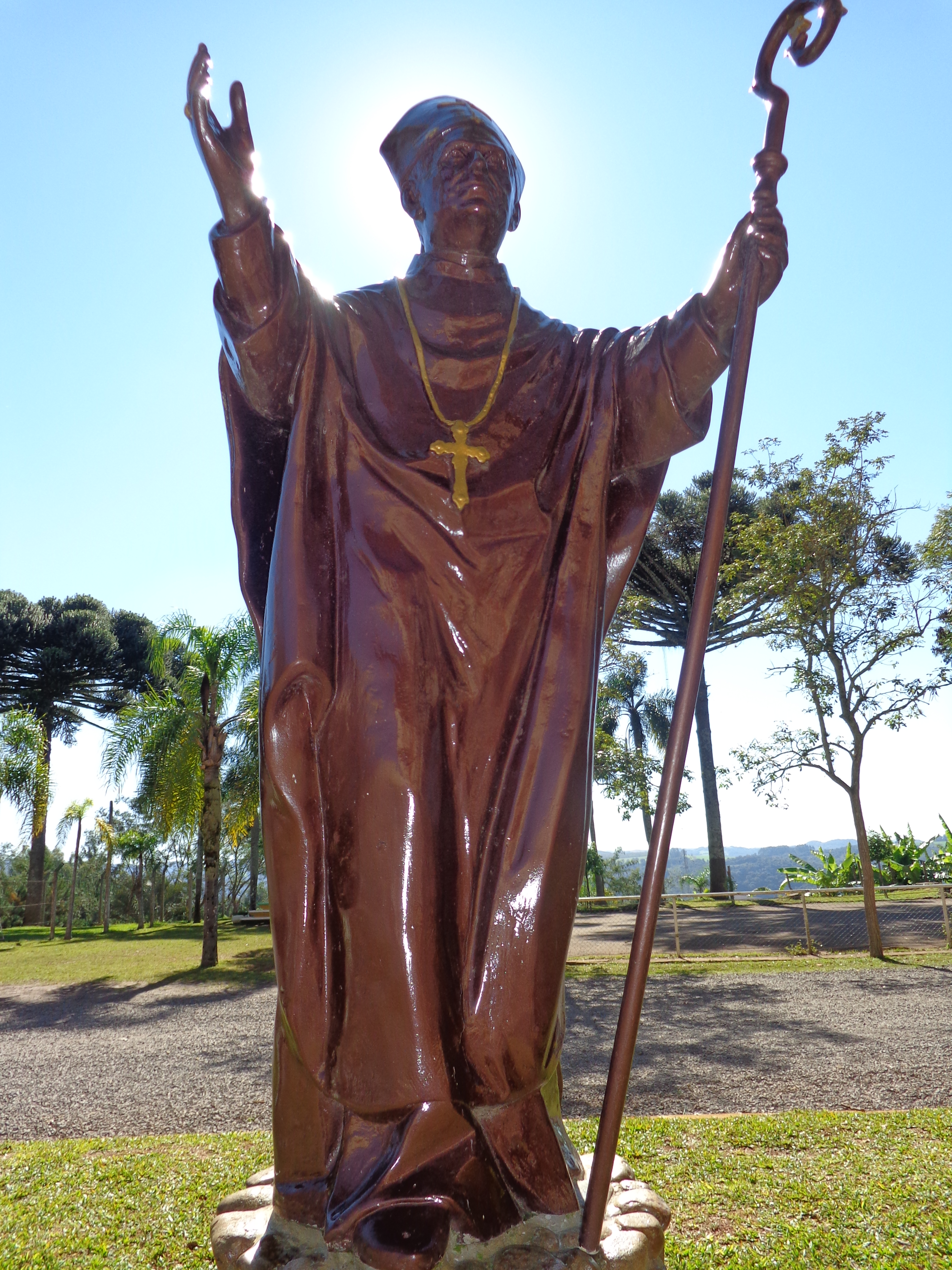 Estatua del Beato Juan Bautista Scalabrini en Guaporé, Brasil